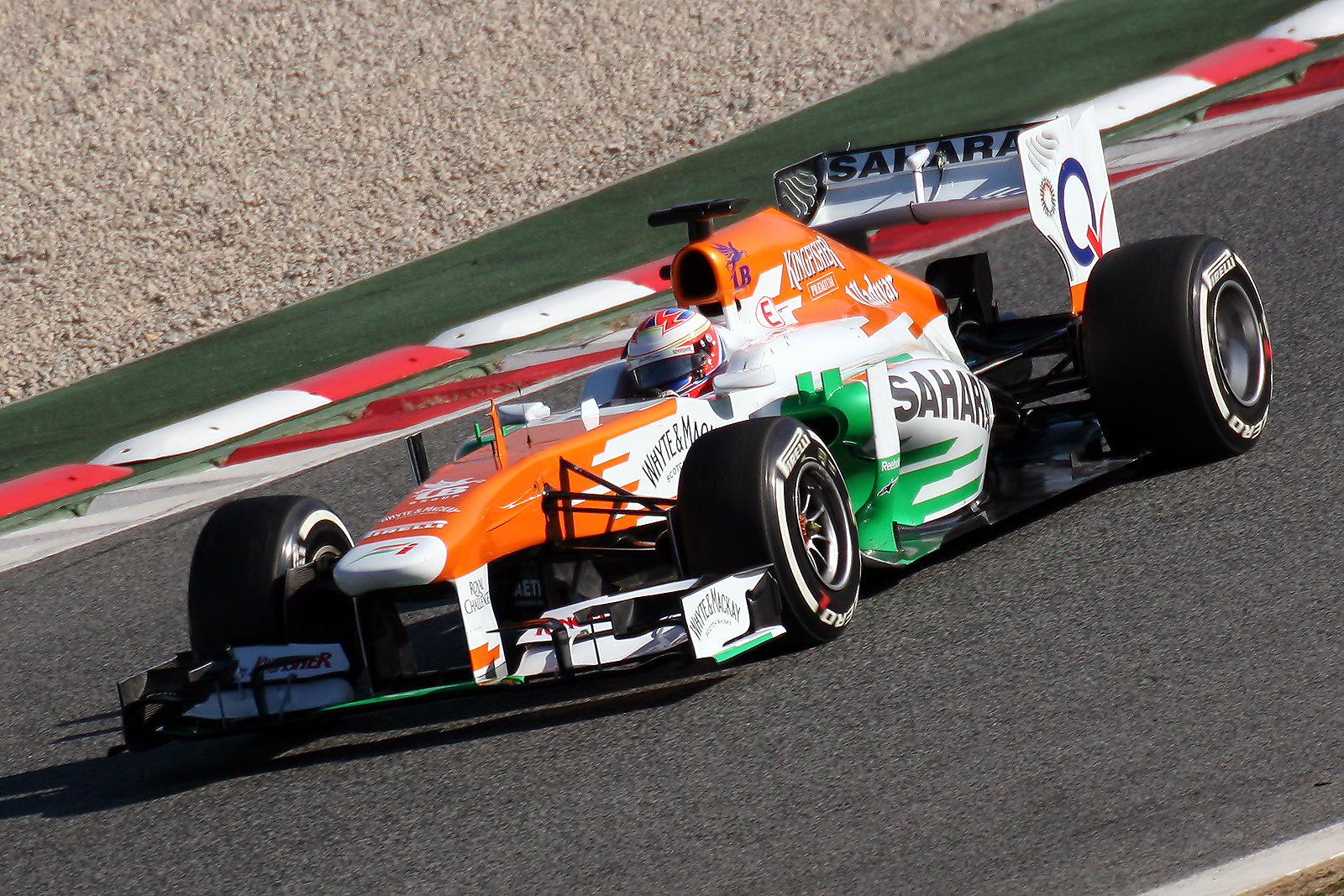 F1 Tests - Circuit de Catalunya, Spain.